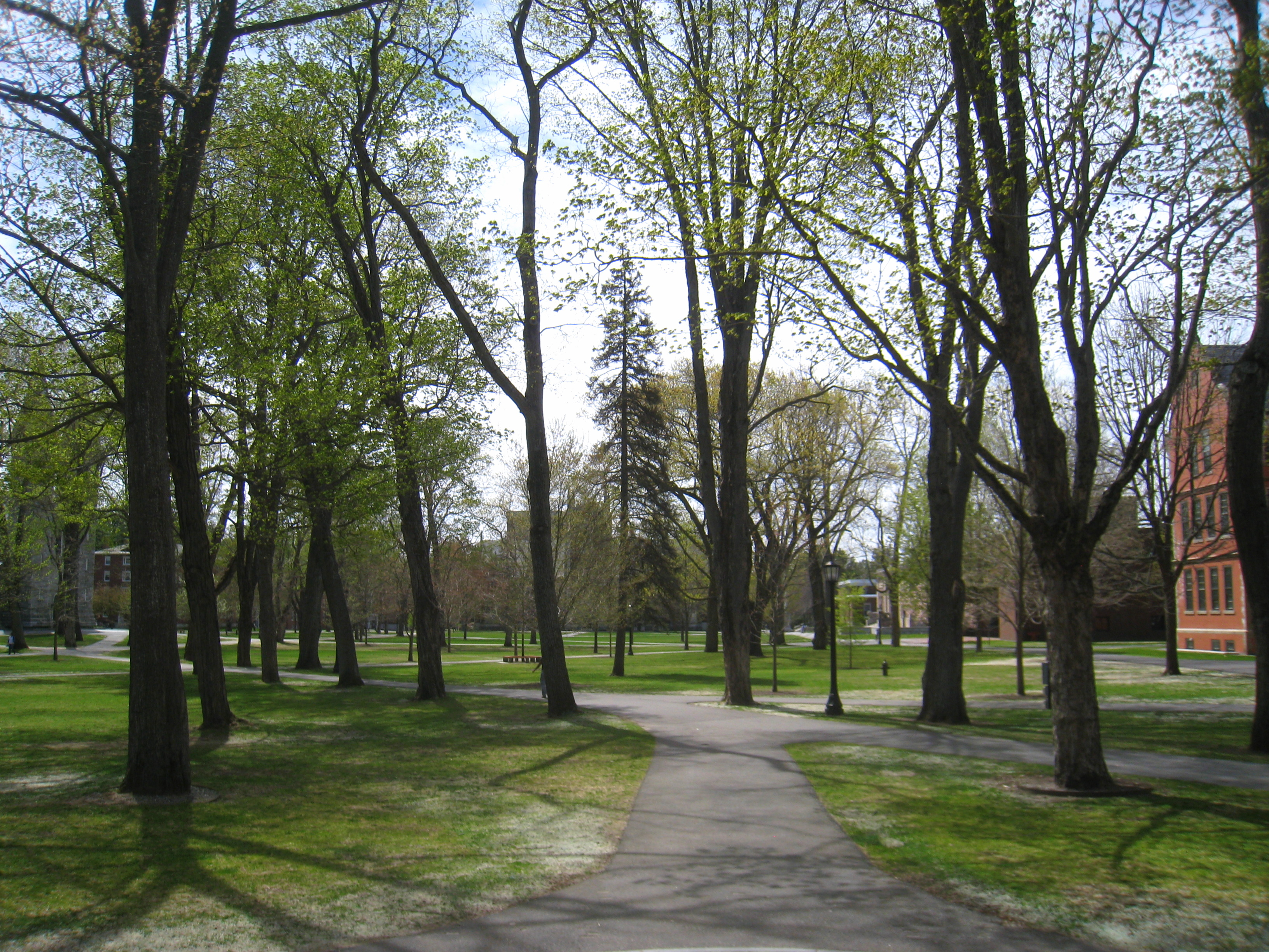 Quad, Bowdoin College, Brunswick, Maine, USA.